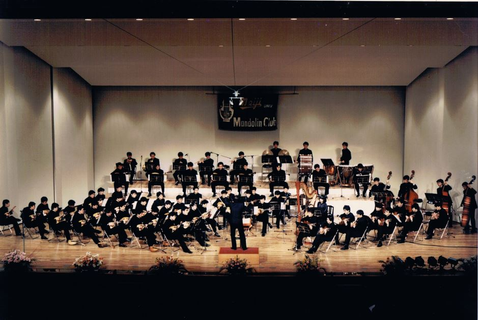 明治大学マンドリン俱楽部